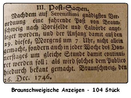 Braunschweigsche Anzeiger über die Einrichtung einer Fahrpost von Braunschweig nach Calvörde